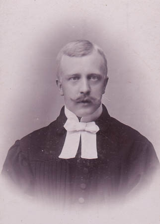 Porträt von Walther Paucker